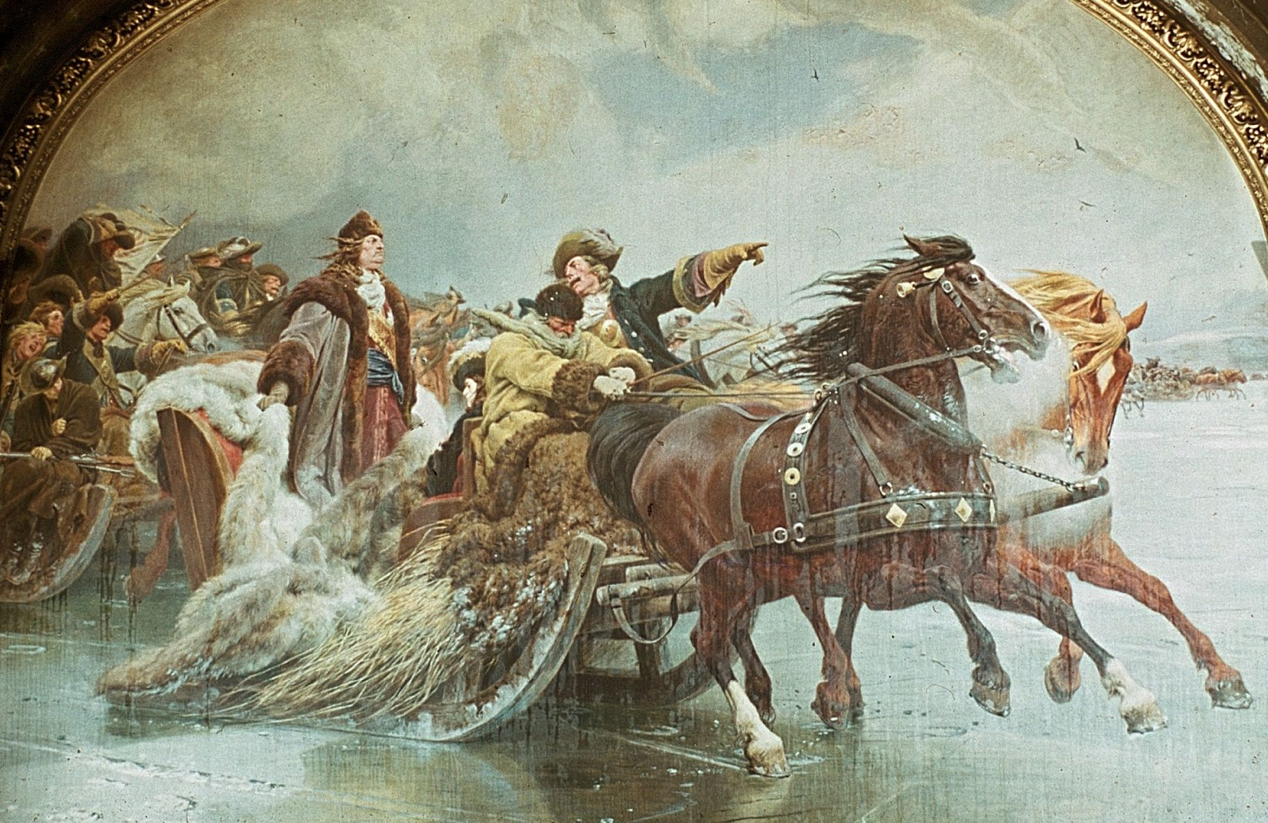 Wilhelm Simmler: Übergang über das Kurische Haff 1679, um 1891. Wandbild für die Ruhmeshalle Berlin, c. 1944 nach Bombentreffer zerstört. Aufnahme um 1943/44 Hintergrund: Winterfeldzug 1678/79 in Ostpreußen